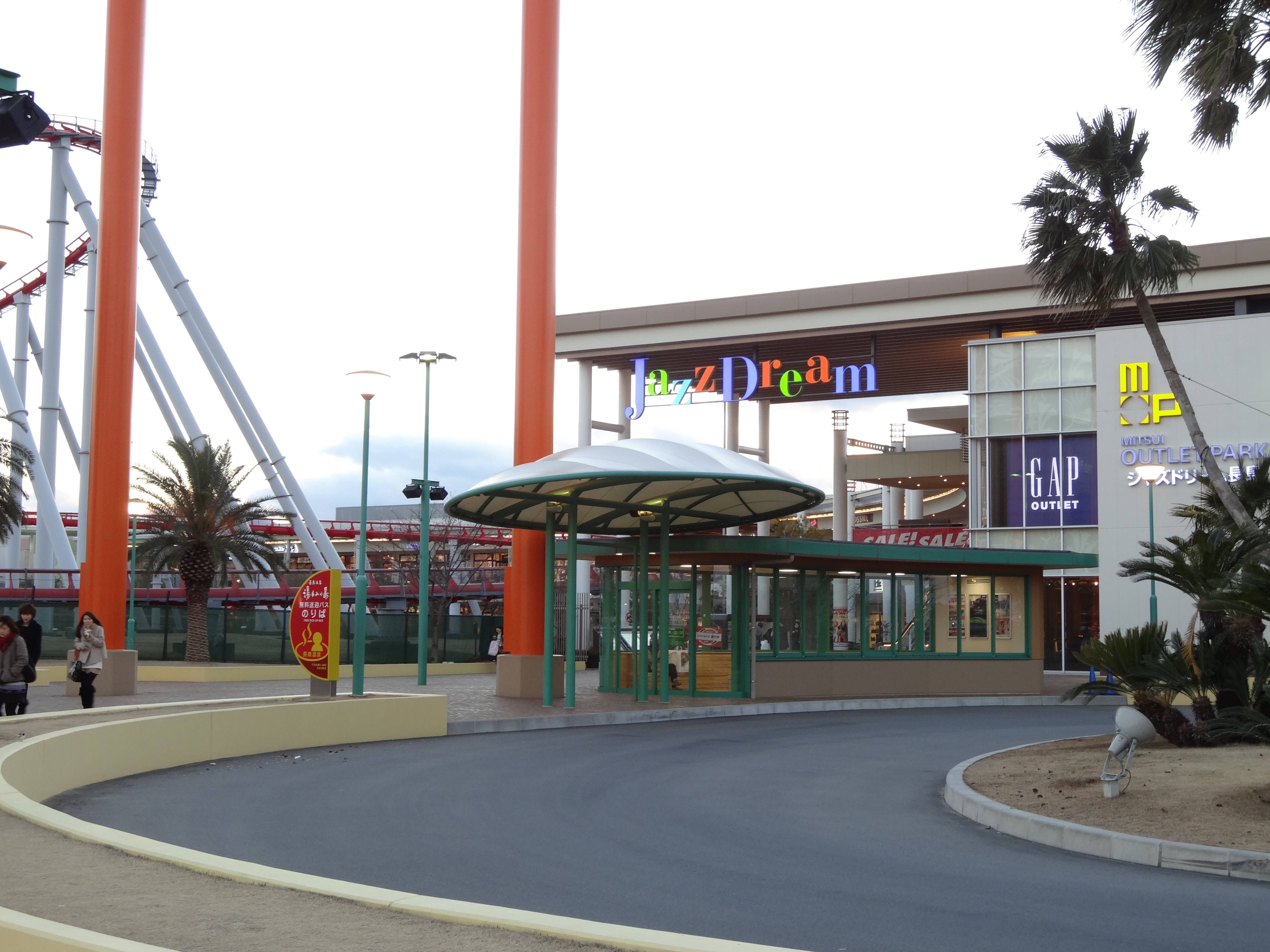 MOPジャズドリーム長島のメインエントランスにて